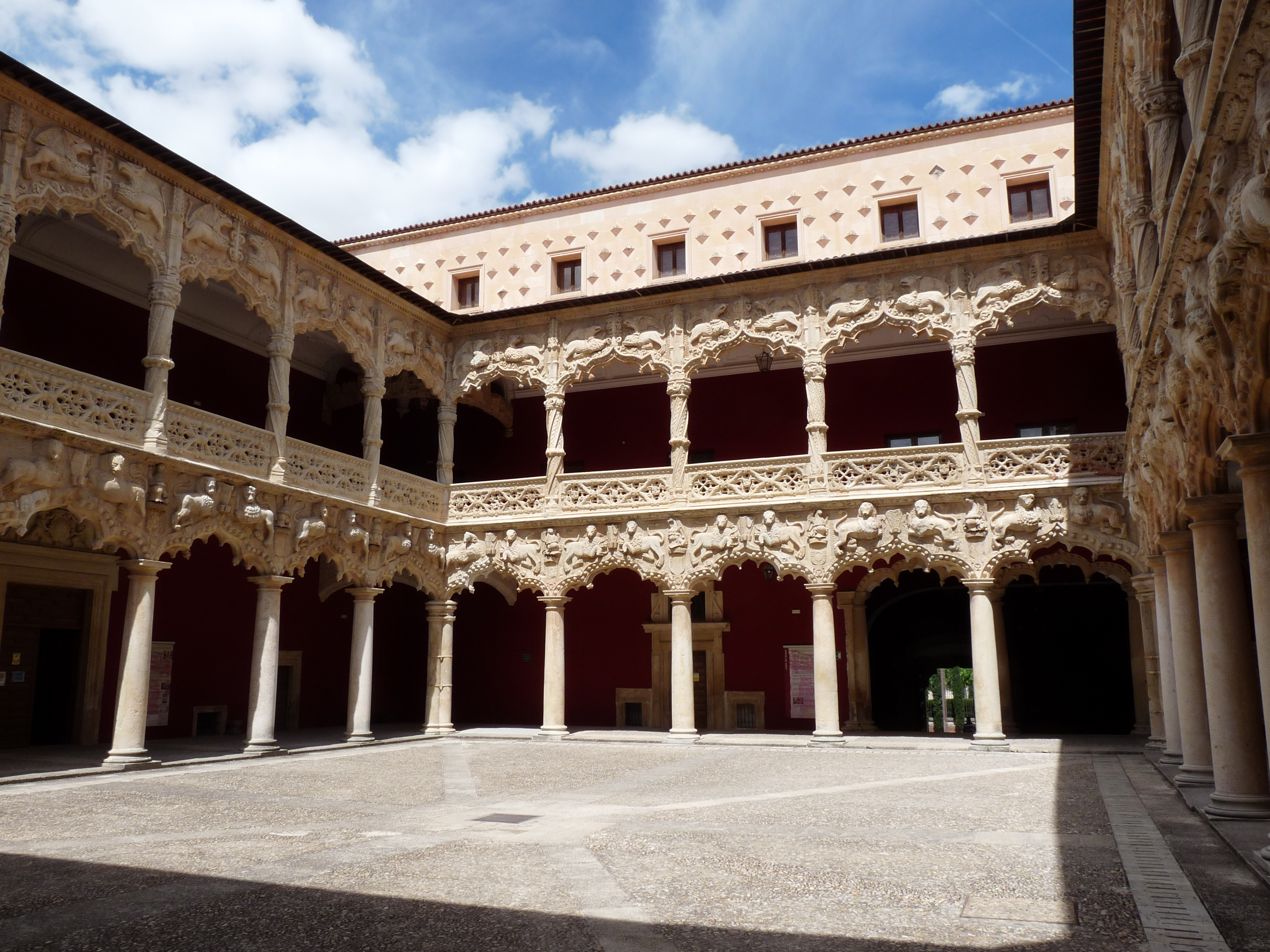 Binnenplein van het paleis